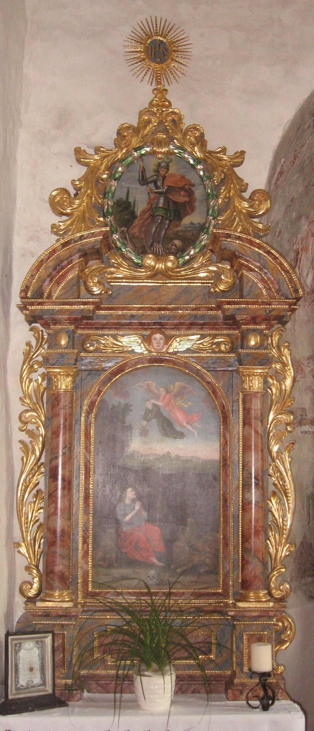 Altar inside Saint George church on Danielsberg, about 1700.